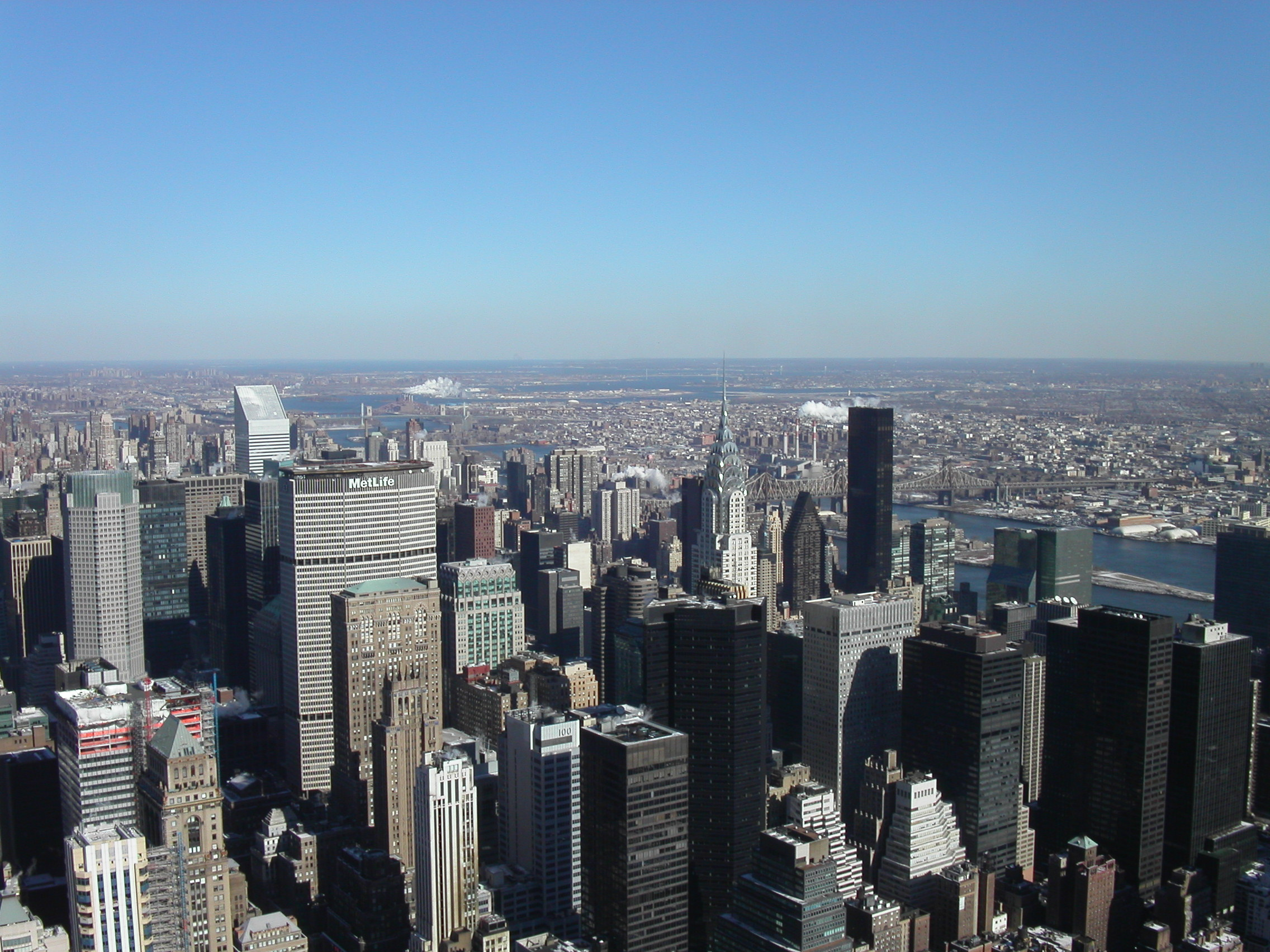 New York, vue depuis l'Empire State Building auteur : utilisateur:Marc Mongenet date : janvier 2003 licence